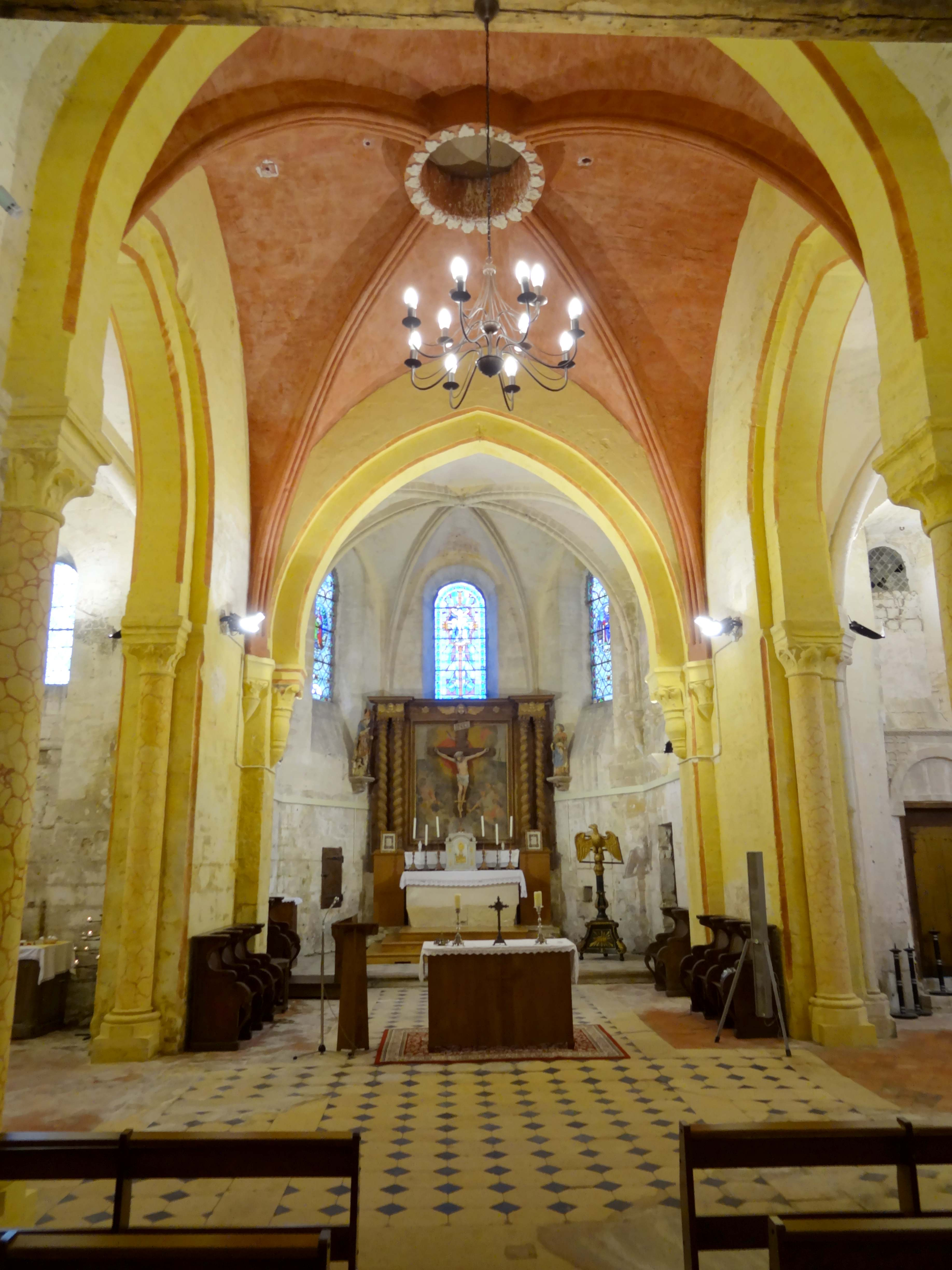 Intérieur de l'église - voir titre.